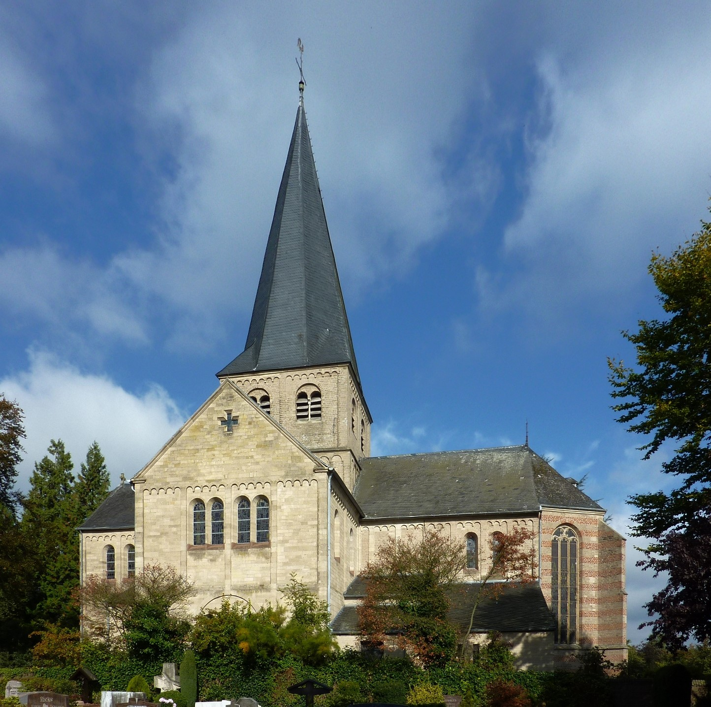 St. Markus (Schneppenbaum)